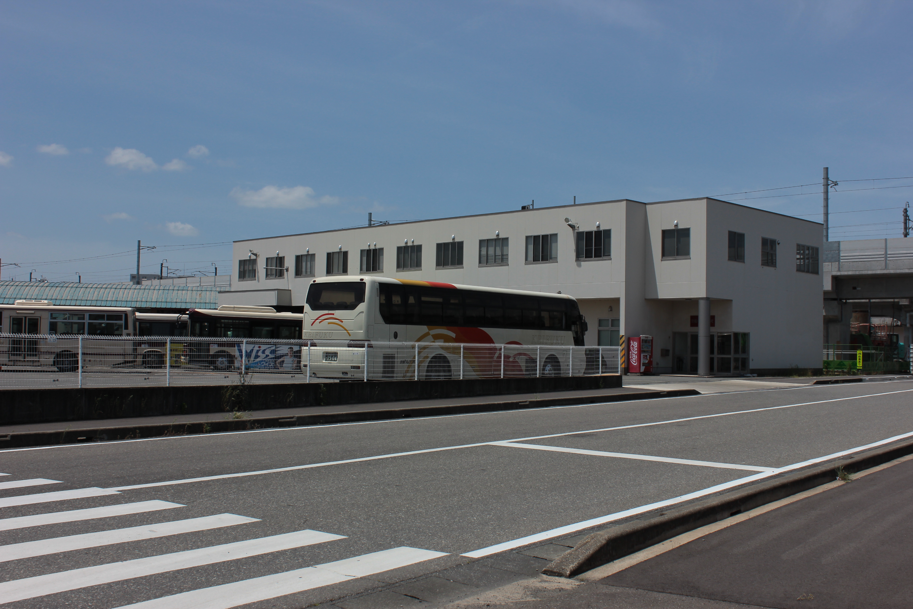 京福バス本社（福井県福井市） Canon EOS Kiss X5